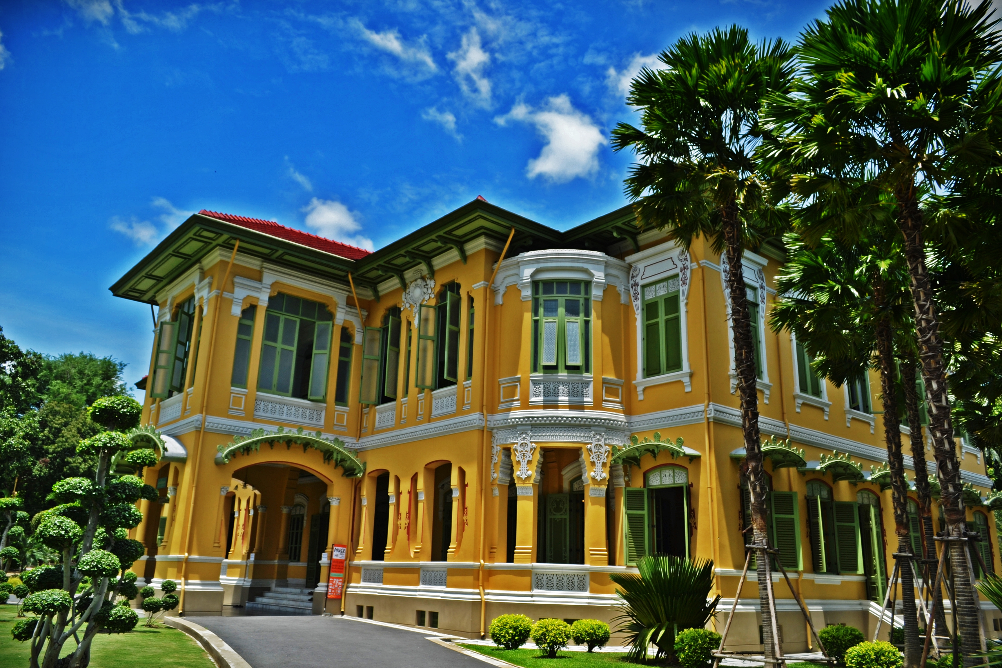 ตำหนักจิตรลดาในวังปารุสกวัน